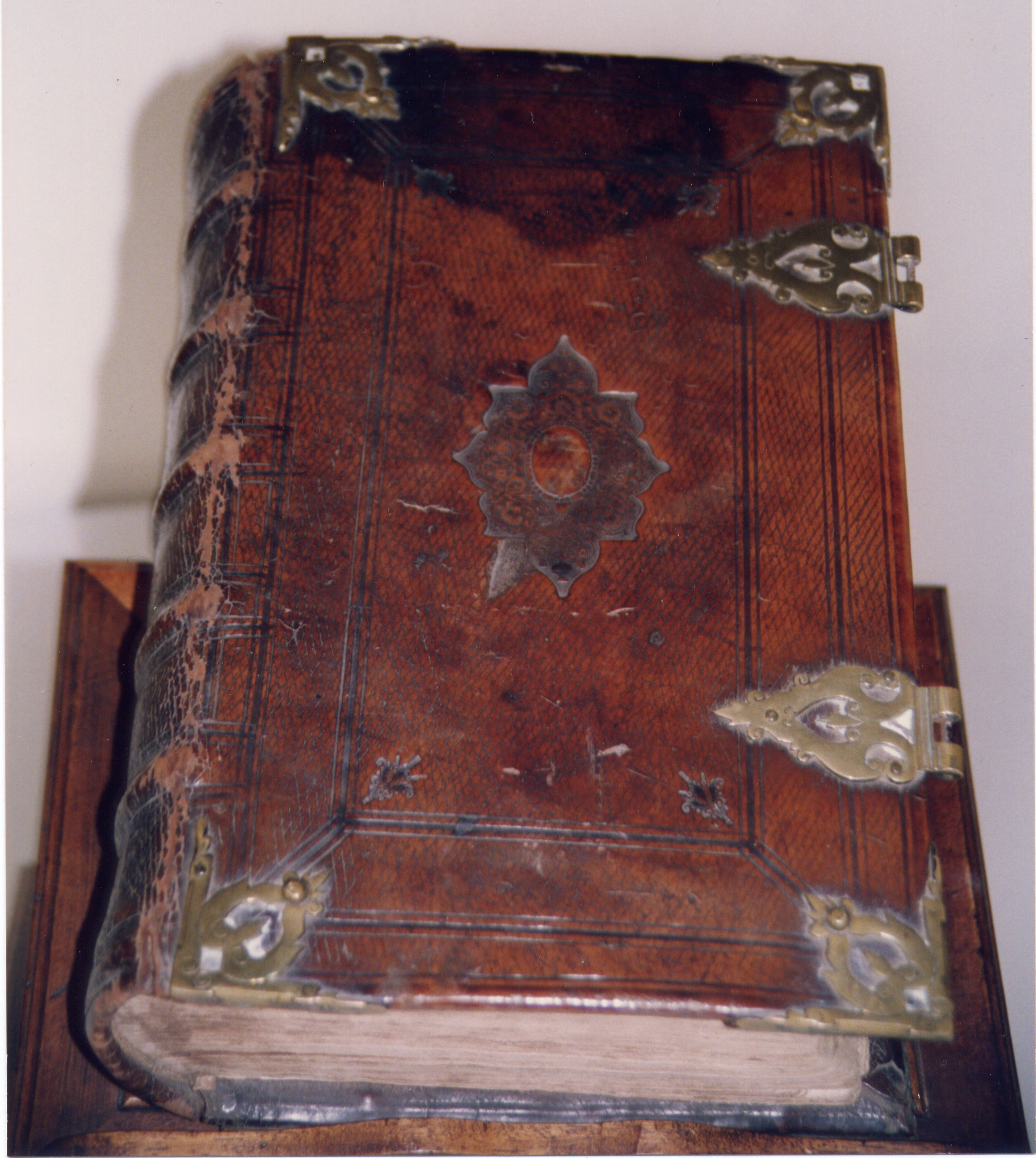 Bible de la famille Lambert Straatman-Fautier, publiée en 1740 à Dordrecht, chez Pieter et Jacob Keur.